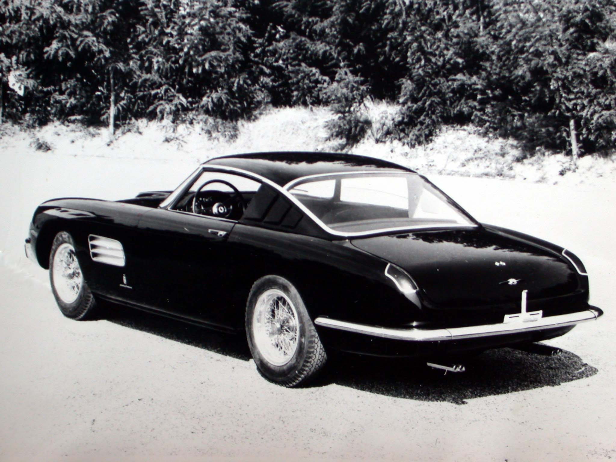 Ferrari 250 GT Speciale by Pininfarina, made "Superamerica" style. This is s/n 0725GT, first black/green and first owned by Prince Bernhard of Lippe-Biesterfeld (1911–2004), a dutch car enthusiast.[1]